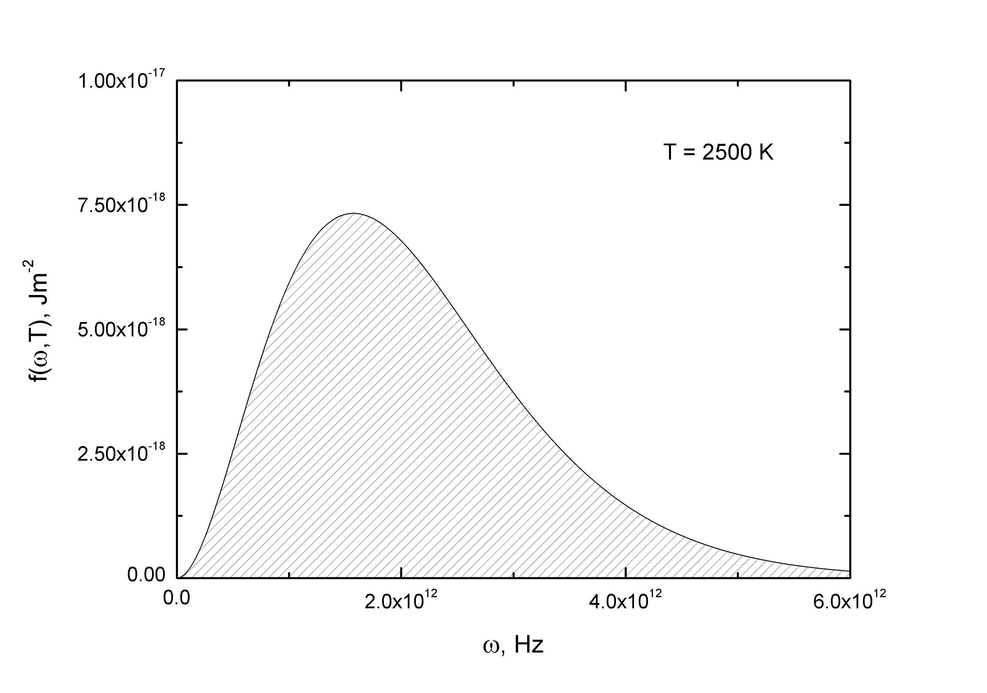 Энергетическая светимость равна площади, ограниченной графиком функции f(ω,Т)